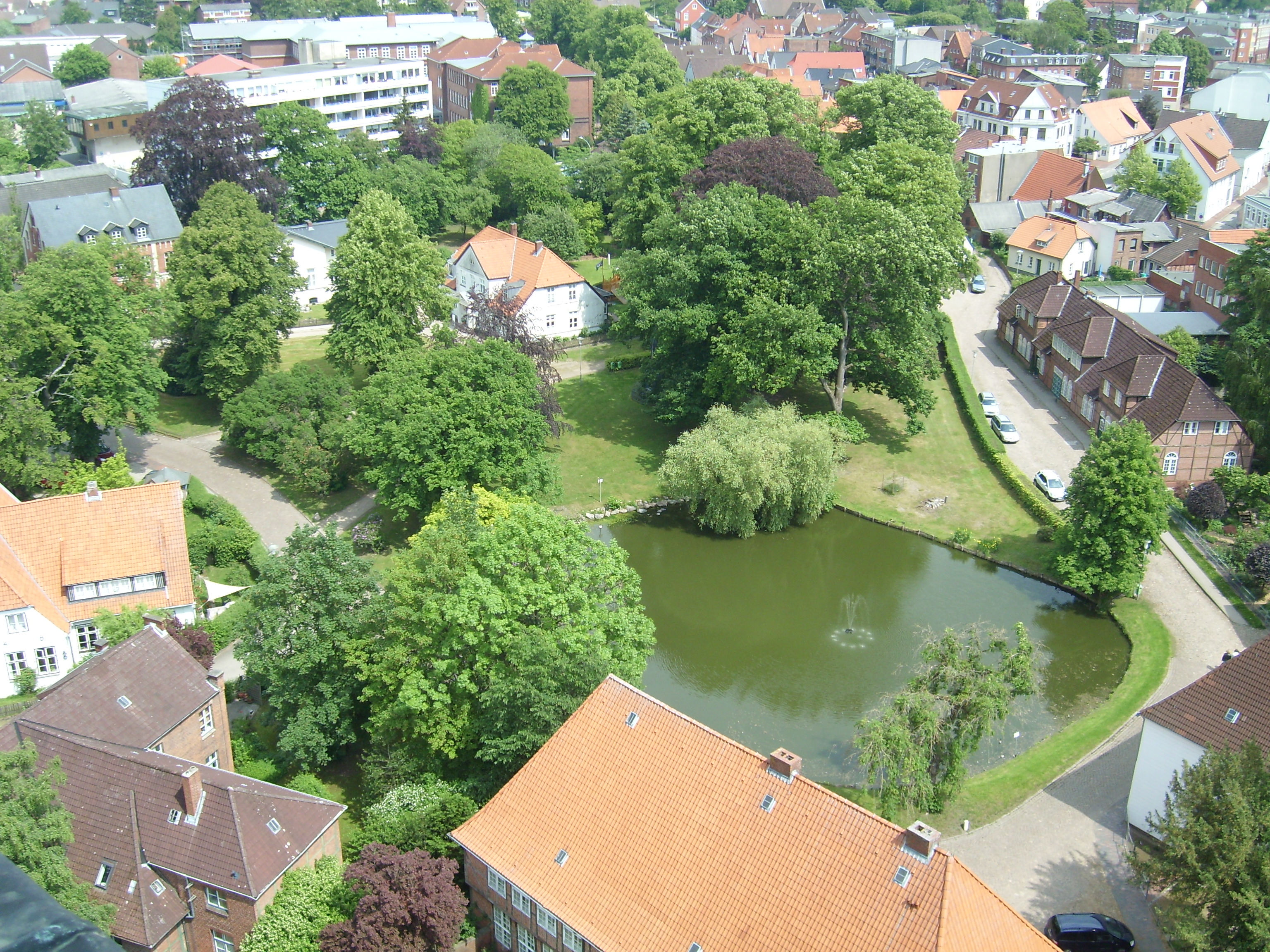 Blick vom Kirchturm St. Laurentii auf den Klosterhof